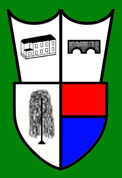 Escudo de Sauceda